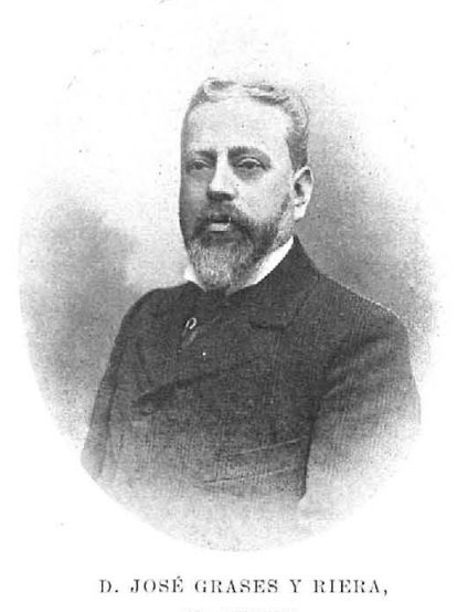 Retrato de José Grases Riera